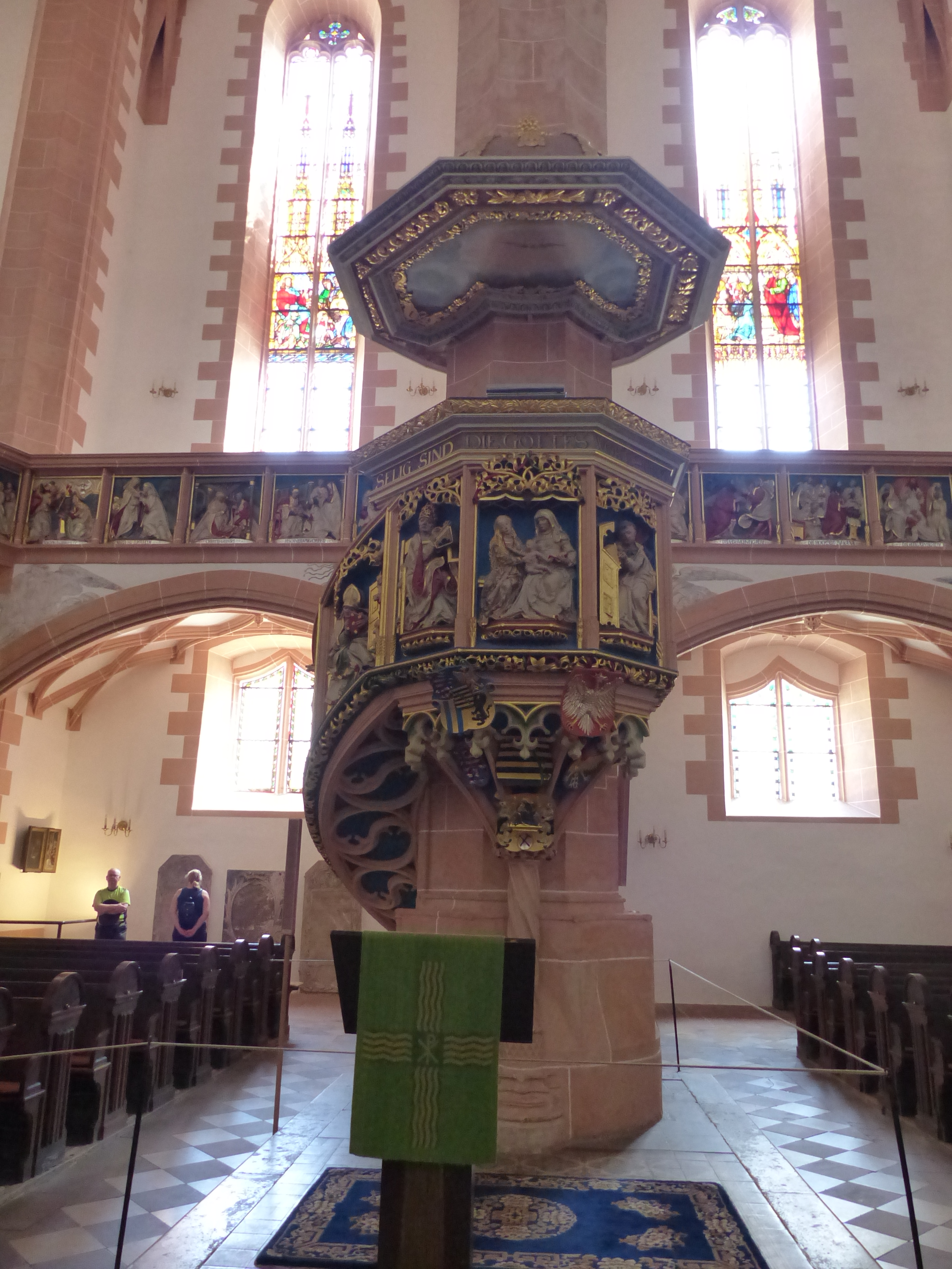 St. Annenkirche (Annaberg-Buchholz), Sachsen